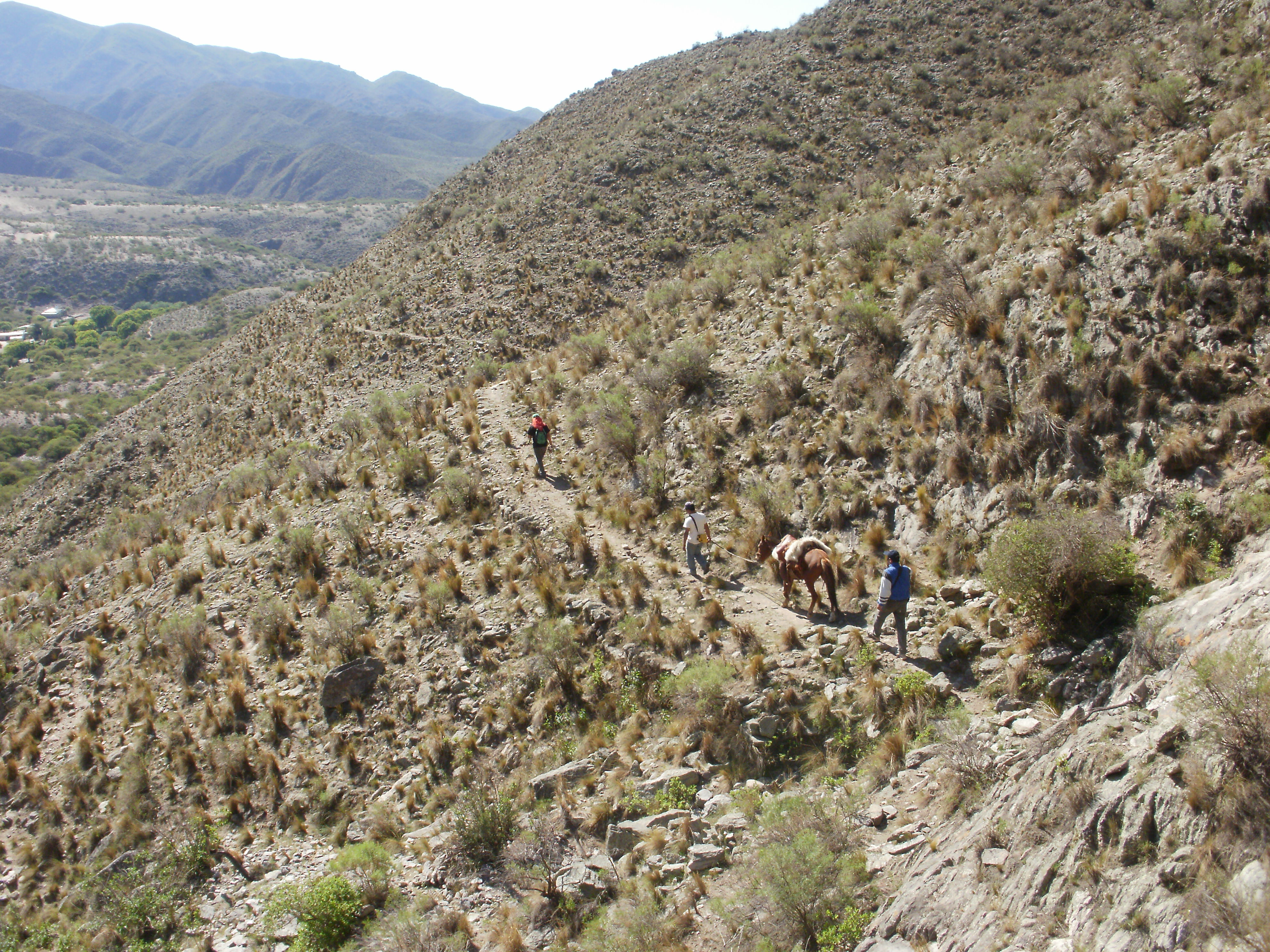 Andenstraßensystem Qhapaq Ñan, Abschnitt Pucará del Aconquija in Argentinien